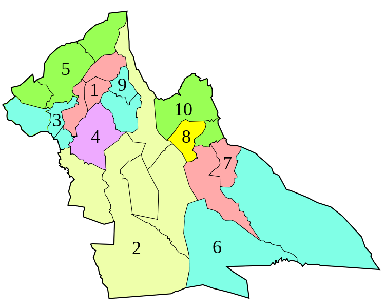 Wilaya_de_Laghouat_map_dairas_numbers